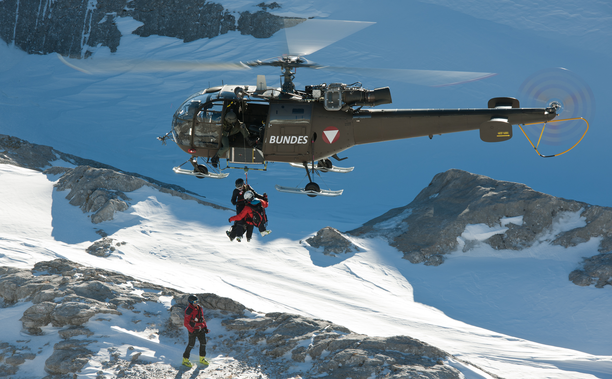 Die Seilwinde kommt zum Einsatz, wenn eine Landung nicht möglich ist.